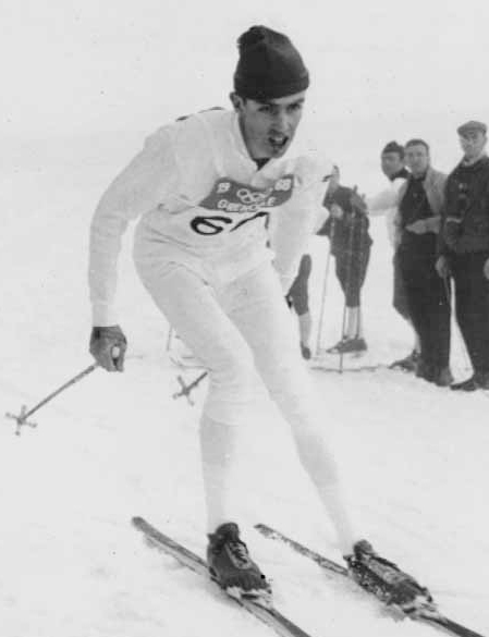 Gunnar Larsson (skier), Grenoble Olympic 1968